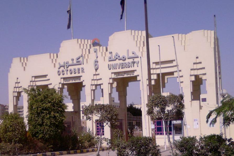 إحدي بوابات جامعة السادس من اكتوبر